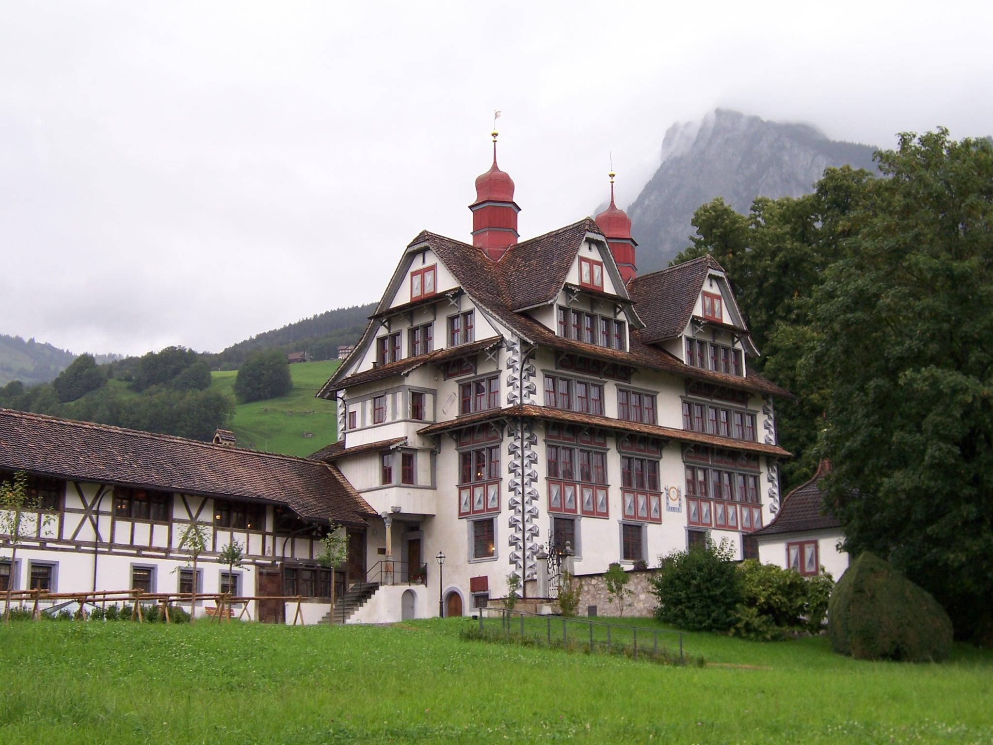 Ital-Reding-Haus in Schwyz (Kanton Schwyz, Schweiz), frühes 17. Jahrhundert eigene Aufnahme vom 29. August 2006